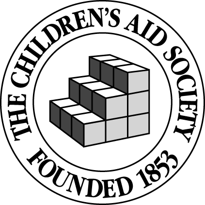 Logo actuel de la Children's Aid Society